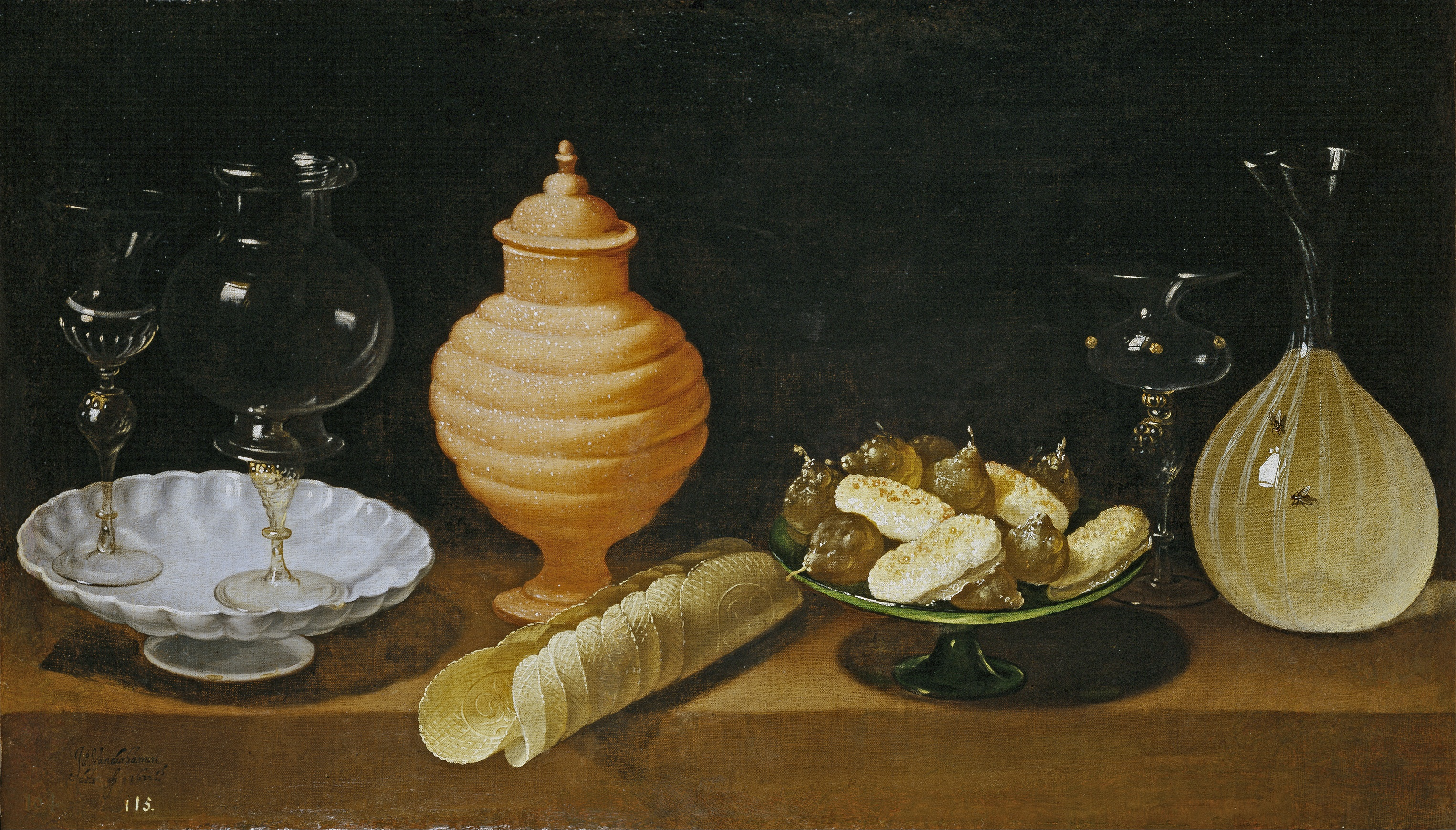 Descripición detallada, de izquierda a derecha: dos copas de cristal sobre una salvilla de loza blanca, un fino tarro para miel, obleas de barquillo, otra salvilla -quizá de peltre lacado en verde- con peras en dulce y bizcochos de mermelada, otra copa de fantasía y una redoma con vino dulce o manzanilla, con dos moscas.